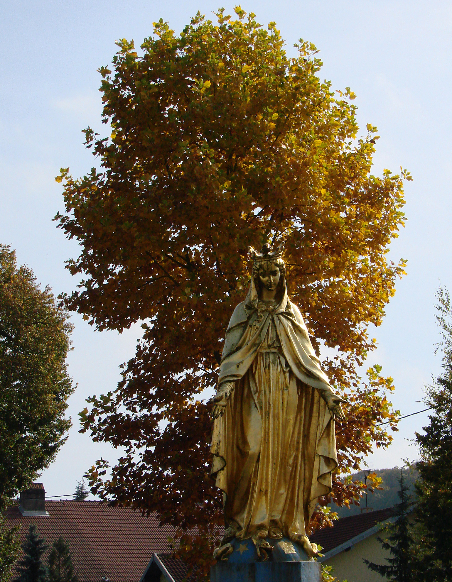 Vierge dorée, statue sur une place à Combeaufontaine, dans la Haute-Saône.